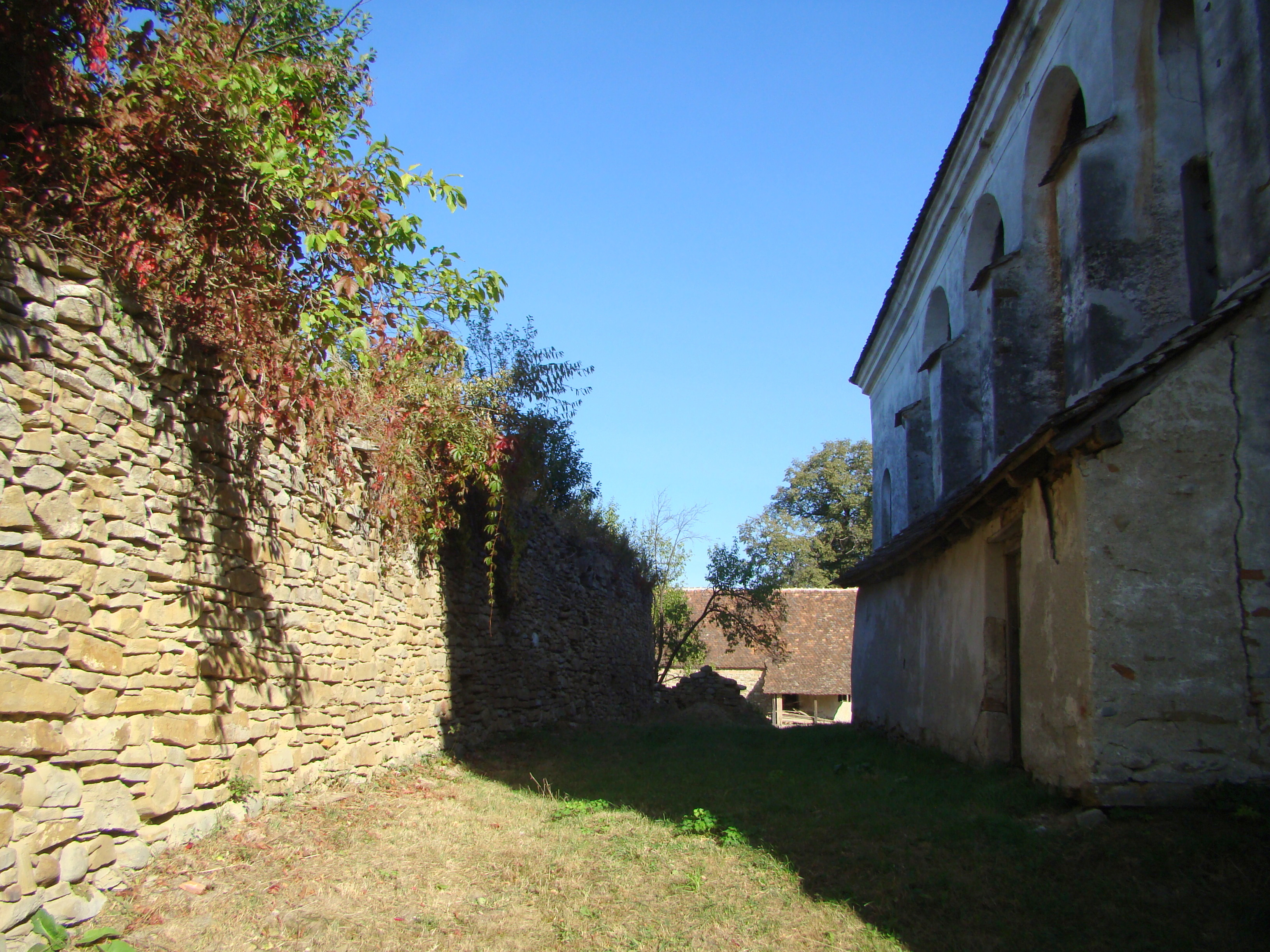 Biserica evanghelică, sat Rodbav; comuna Șoarș 115 sec. XIII-XIX